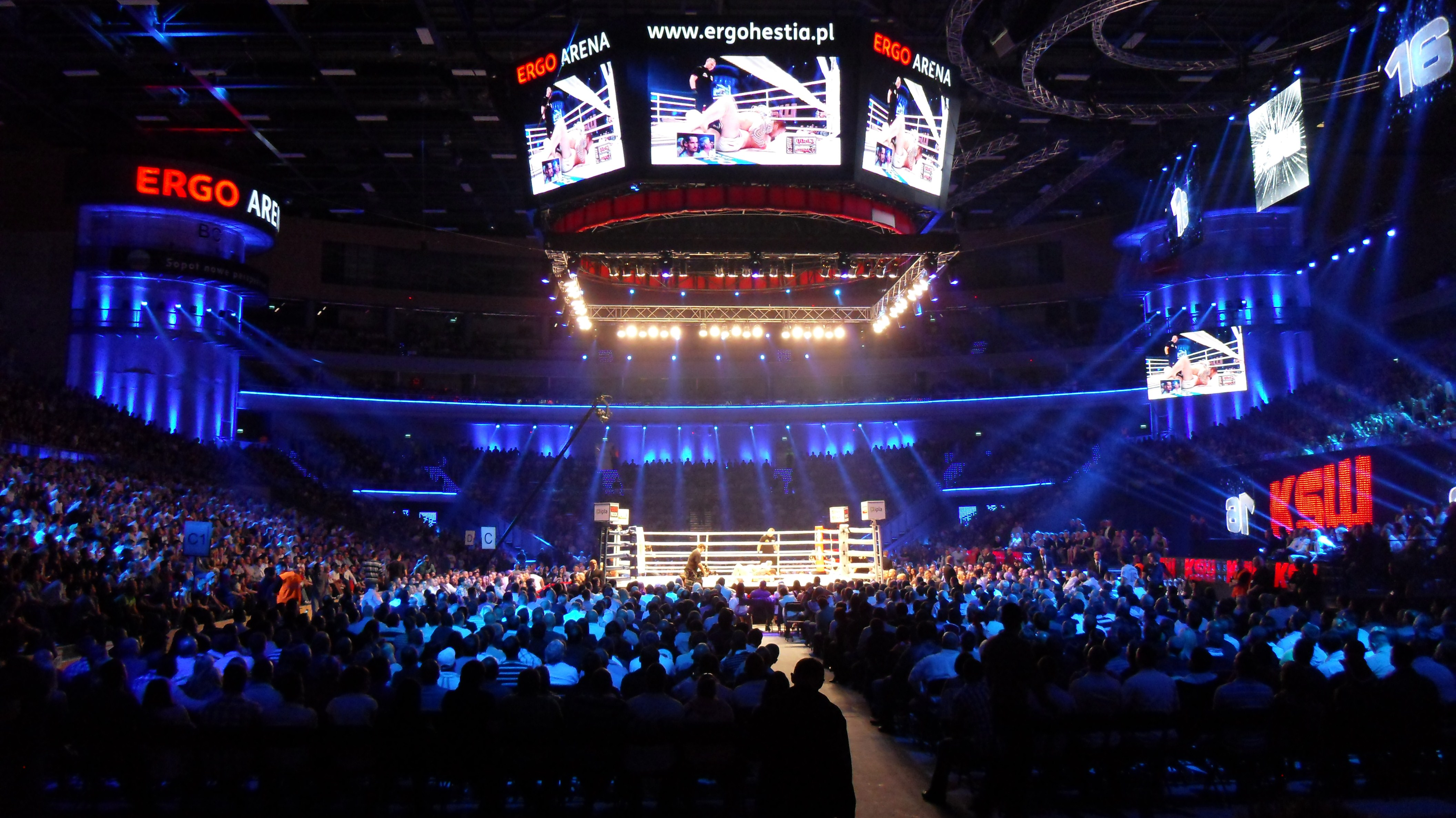 Hala Ergo Arena, na granicy Gdańska i Sopotu - wnętrze, KSW XVI.